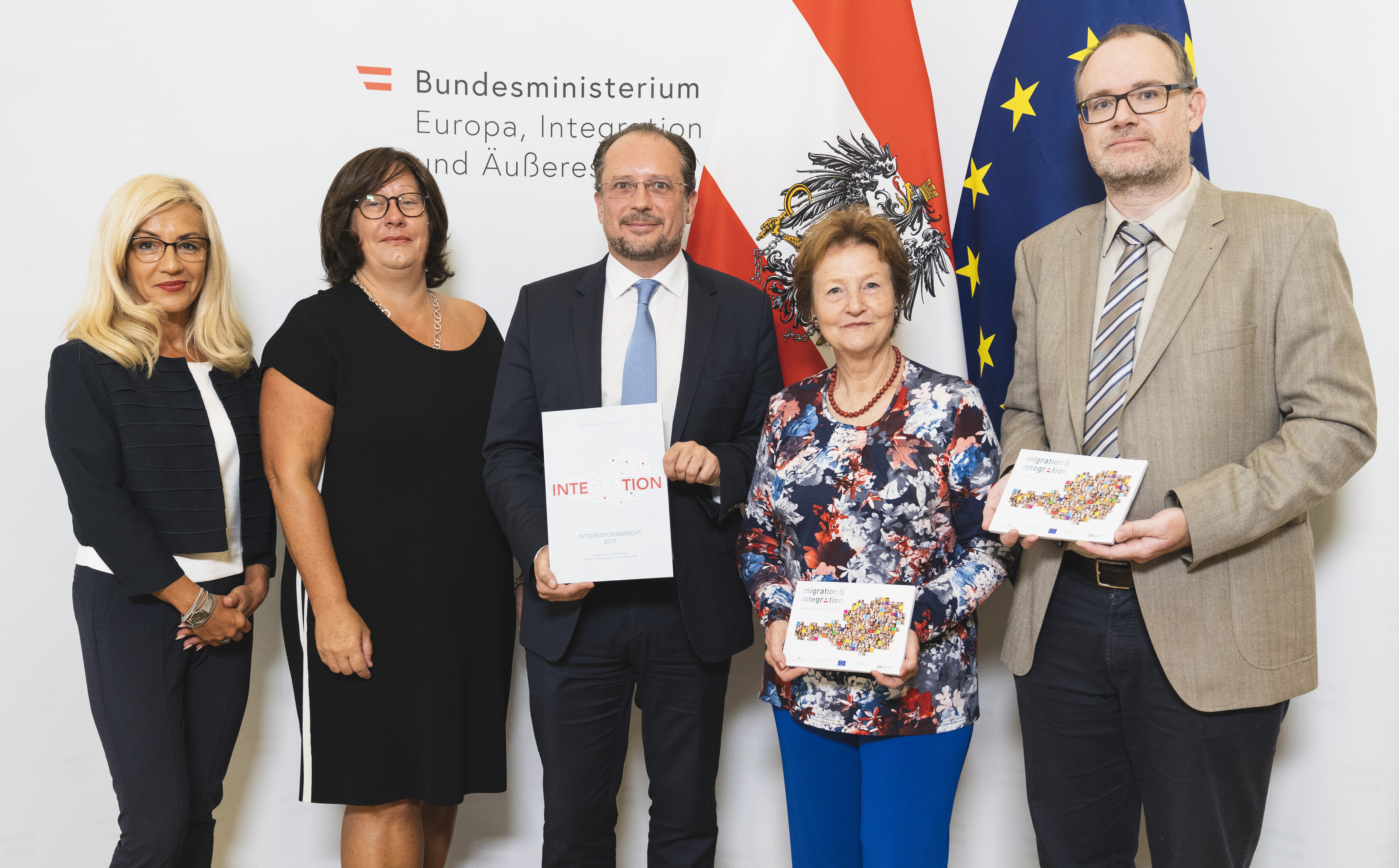 Emina Saric, Katharina Pabel (Vorsitzende d. Expertenrats für Integration), Außenminister Alexander Schallenberg, Gudrun Biffl und Stephan Marik-Lebeck (Statistik Austria) bei der Präsentation vom Integrationsbericht 2019, Wien, 4. September 2019 Copyright: BMEIA/ Eugénie Berger